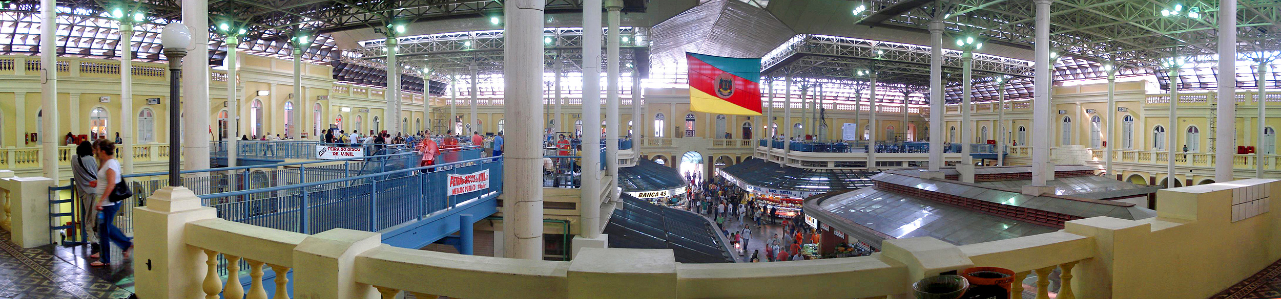 Interior do Mercado Público de Porto Alegre, Brasil. Vista do pátio interno a partir do segundo piso. Fotomontagem a partir de 6 imagens separadas, usando o programa AutoStitch